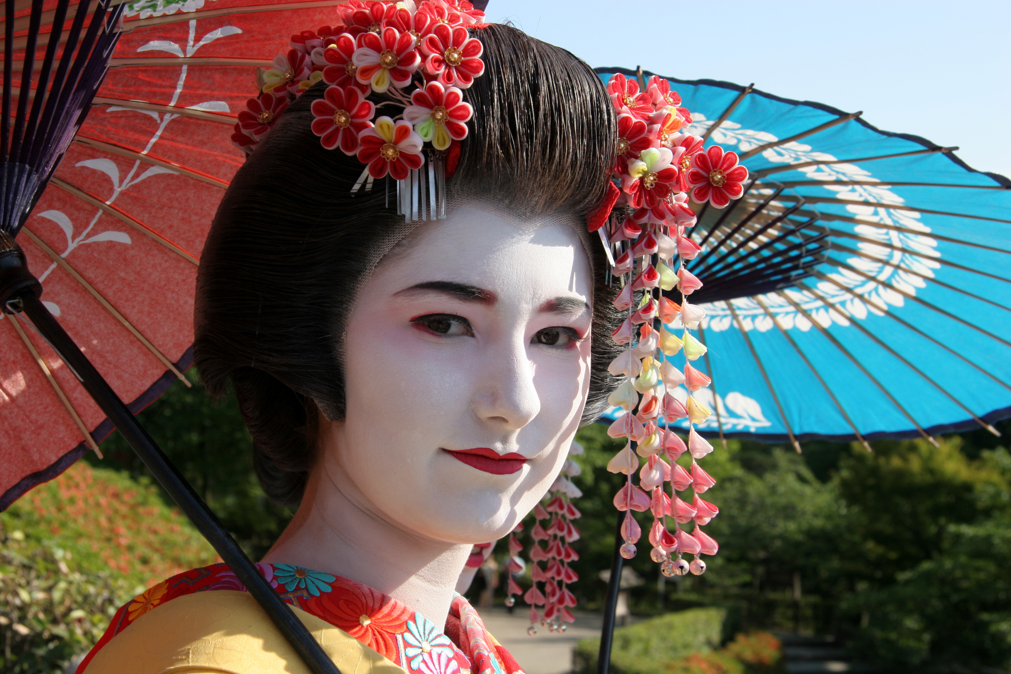 touriste costumée en geisha, Kyoto au Japon